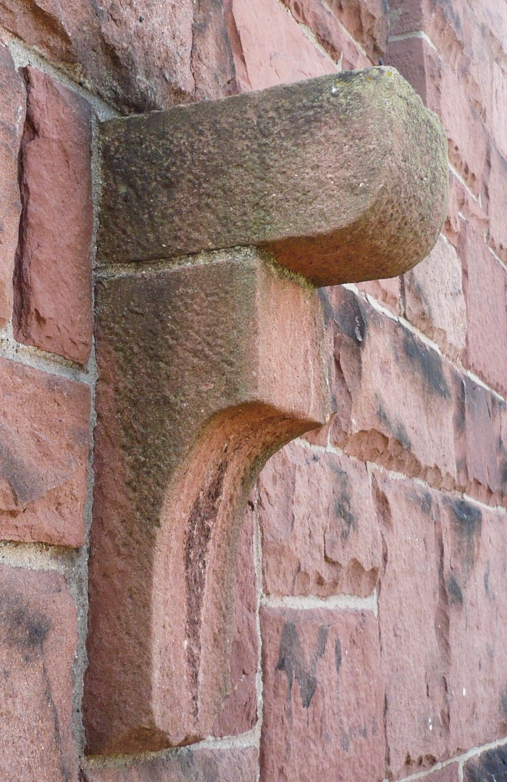 Nowa Ruda, wieża na Górze św. Anny